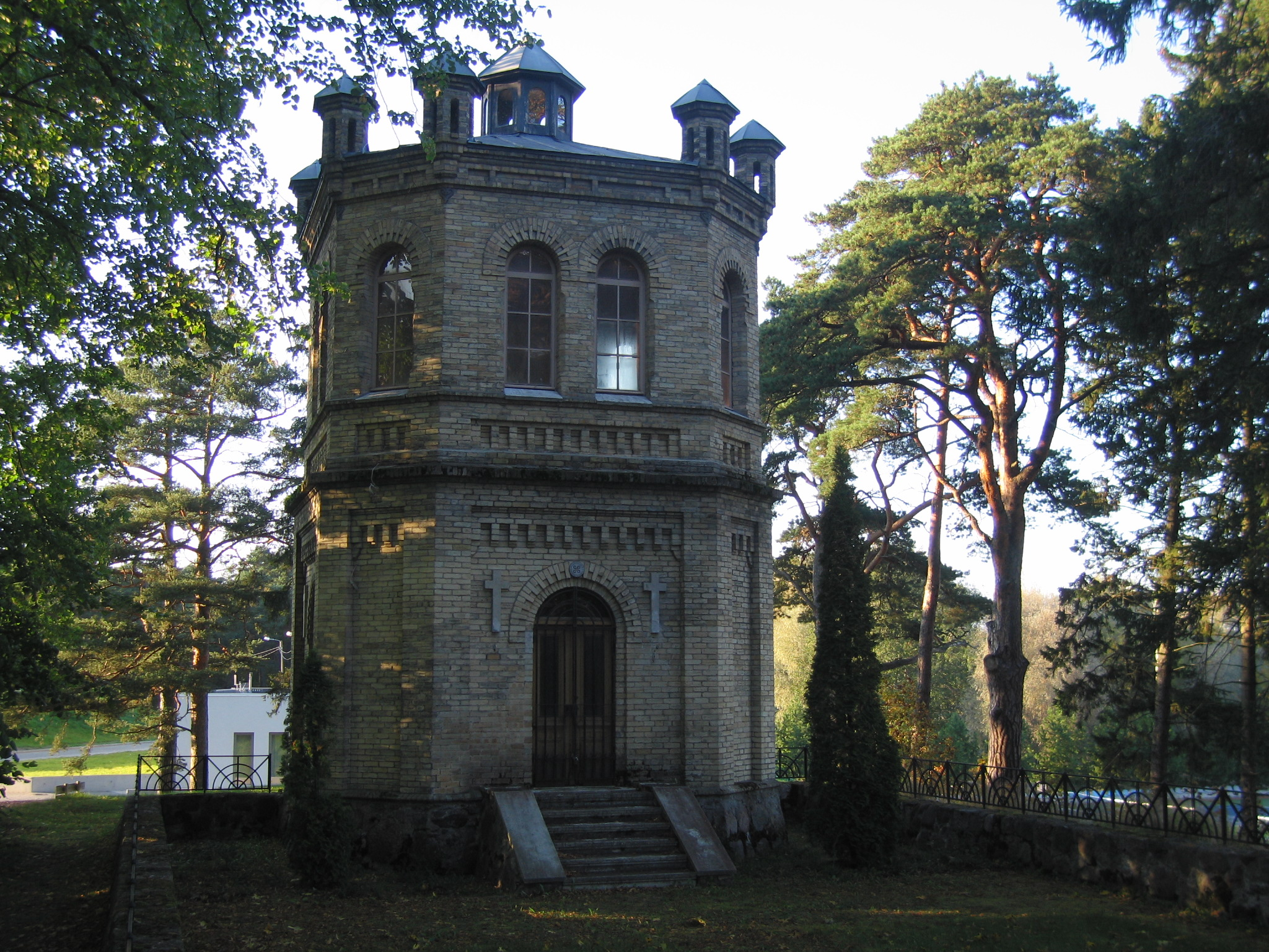 Kose mõisa kalmistu kabeli eestvaade